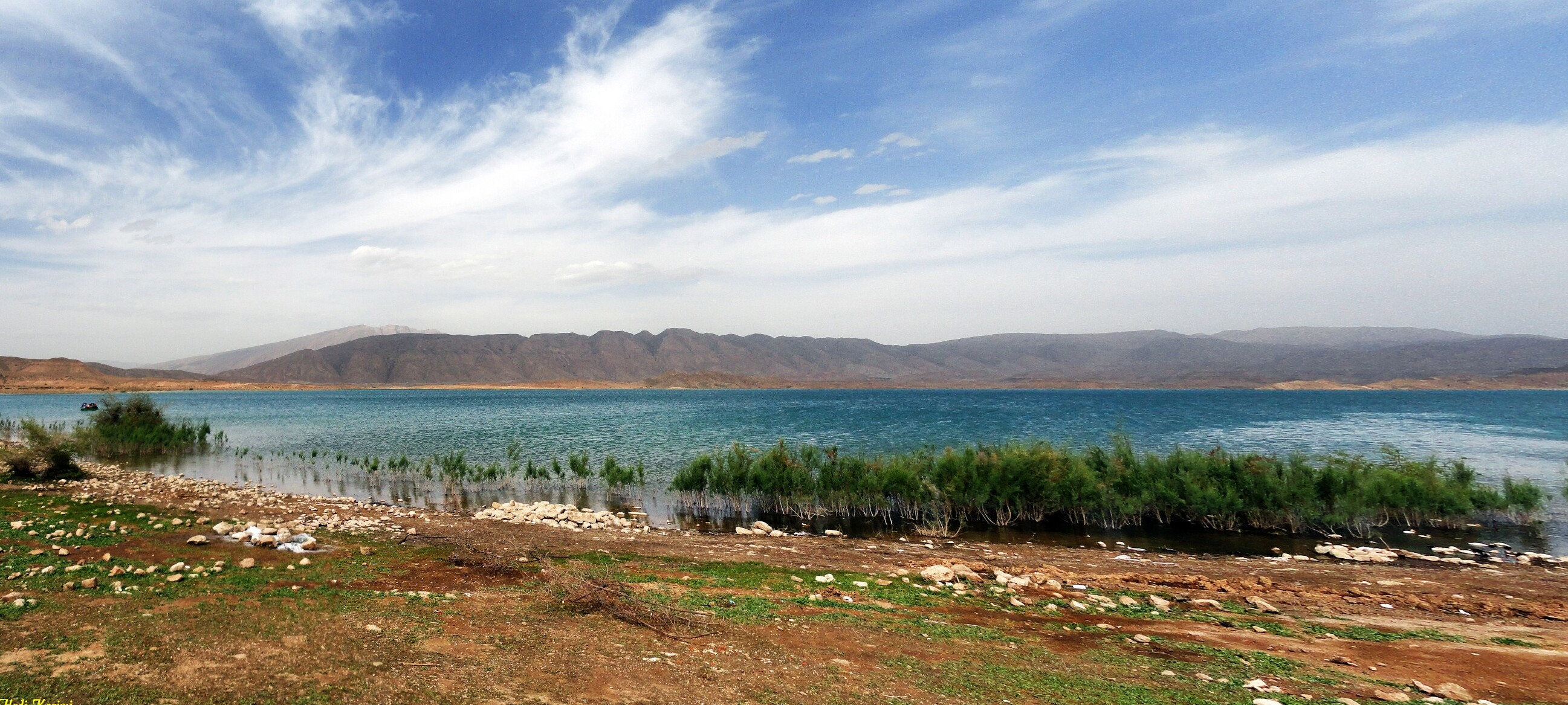 Lake of Ghir Dam دریاچه سد قیر